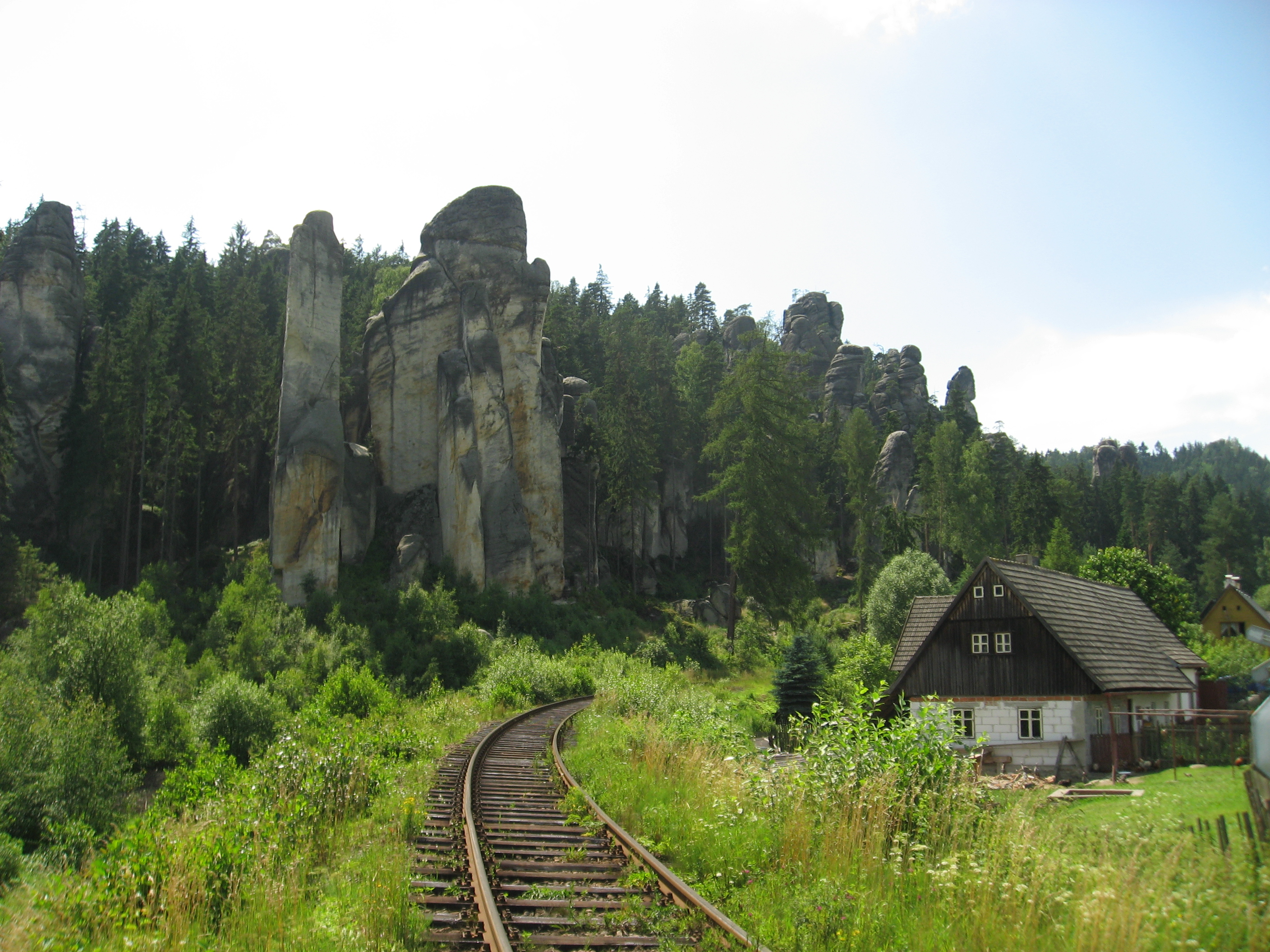 Adršpašskoteplické skály